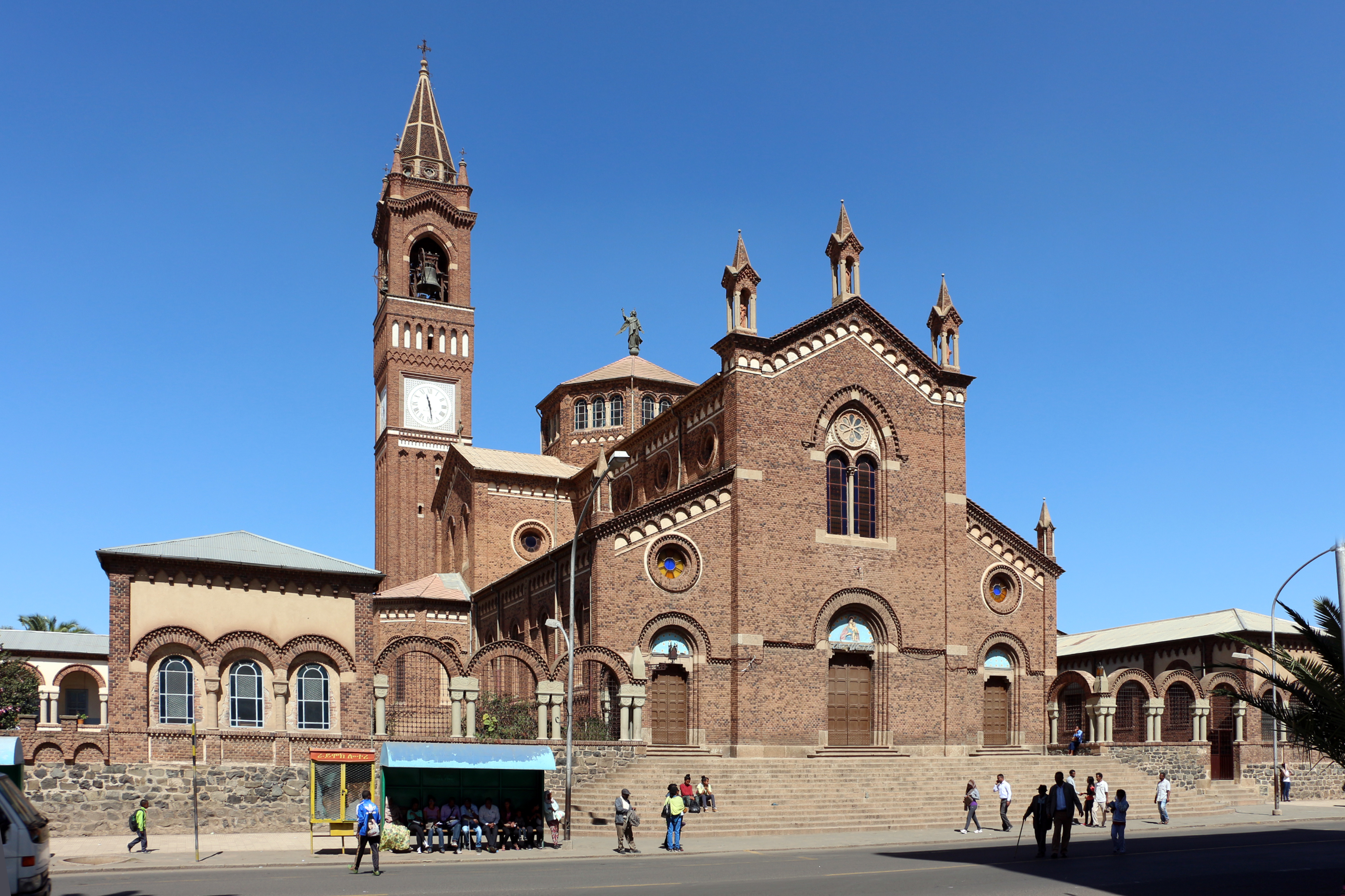 Asmara, cattedrale cattolica, 03.JPG